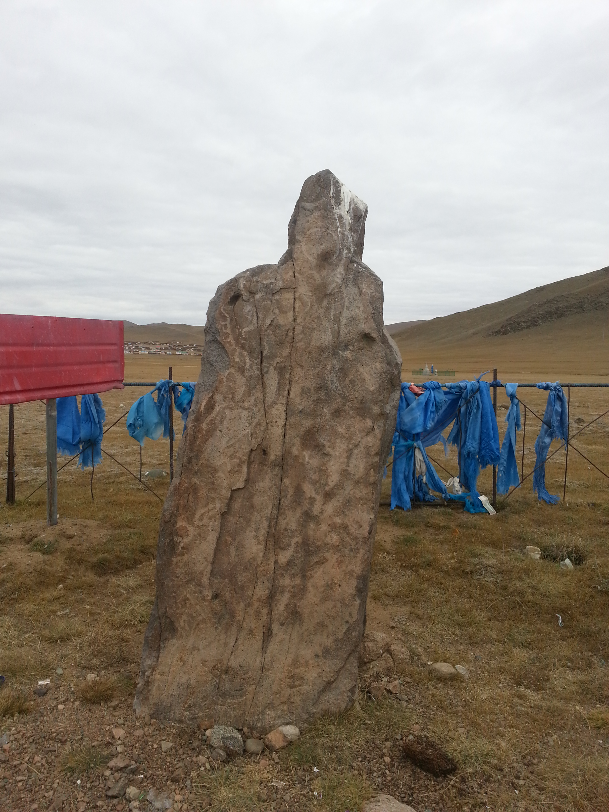 Монгол: Нүүрэн талдаа 9 буга, хойд талдаа 7 бугыг загварчлан дүрсэлсэн нь хэлбэр төрхийн хувьд Монгол-Өвөрбайгалийн буган хөшөөний ангилалд хамаарна. Уг хөшөөний зүүн талаар 12 ширхэг цагираг хэлбэрийн дагуул байгууламжууд байна.